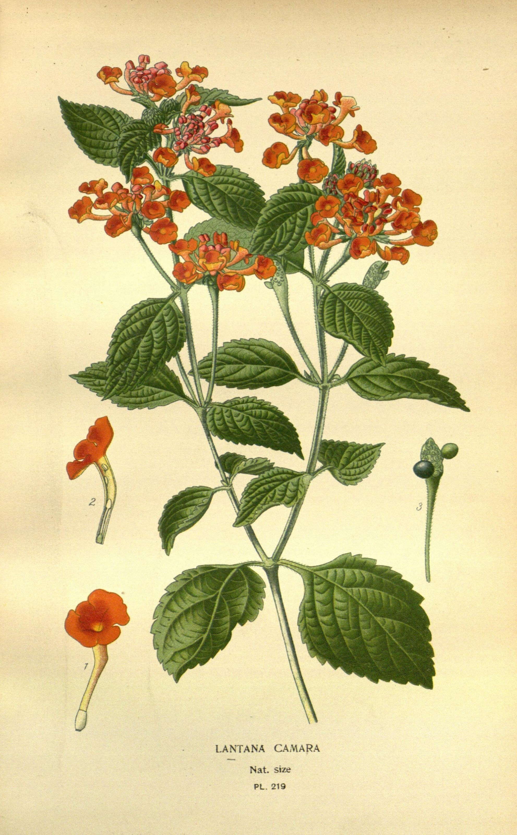 LANTANA CAMARA